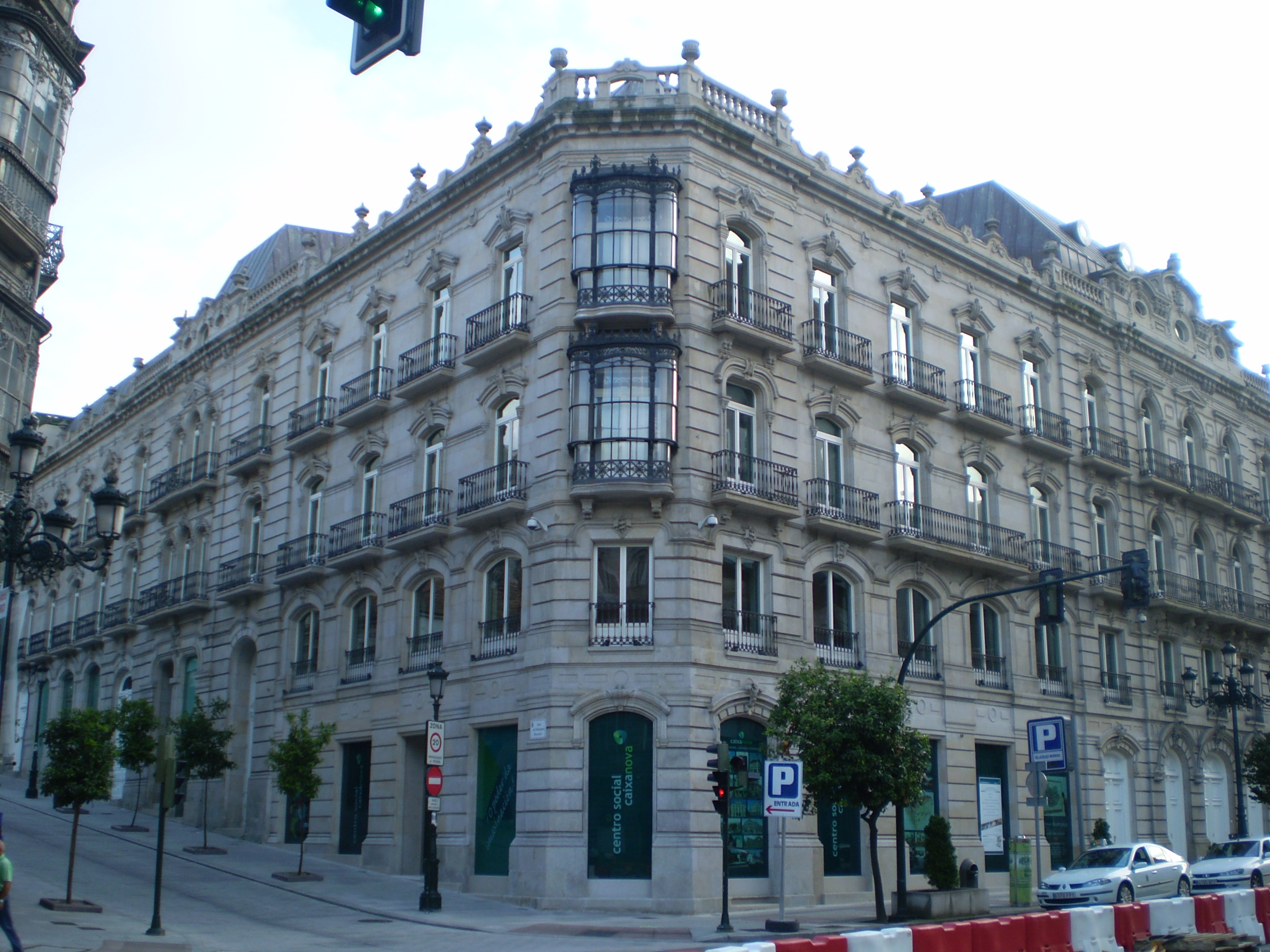 Centro Social Afundación Vigo